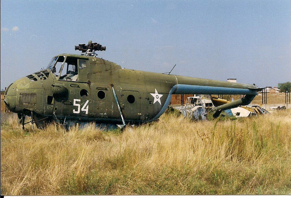 Ausgeschlachtete Mil Mi-4 (NATO-Codename: Hound) auf dem bulgarischen Luftwaffen Museum in Plovdiv